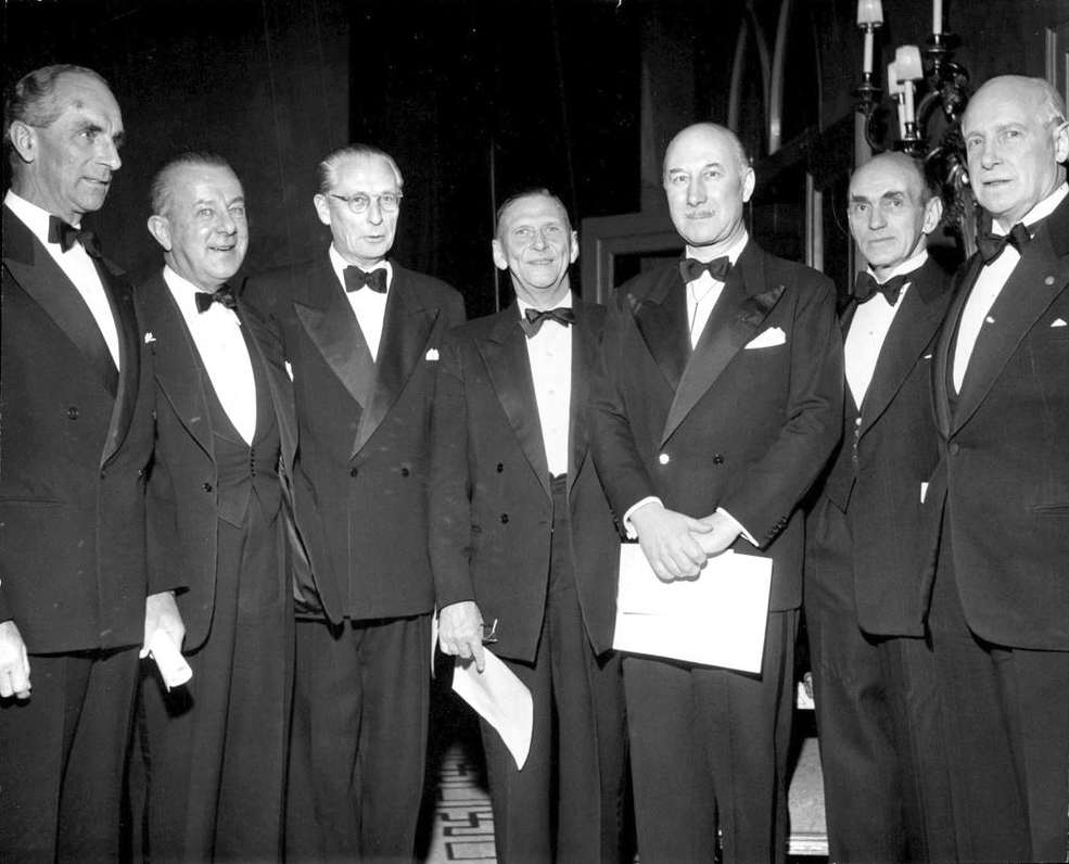 Några av deltagarna i 40-årsjubileet, från vänster överste Carl-Oscar Agell, ryttmästare Carl Strömfelt, överstelöjtnant Ture Moss, major Claes Lindström, hovstallmästare Carl-Eric von Platen, major Lennart Selander och överste Gustaf-Fredrik von Rosen.För att fira 40-årsminnet av utexamineringen från Kungliga krigshögskolan samlades på lördagen ett 50-tal officerare till en jubileumsfest på Grand Hôtel Royal i Stockholm. Antalet utexaminerade 20 december 1915 var 113. Greve Folke Bernadotte tillhörde denna officerskurs.